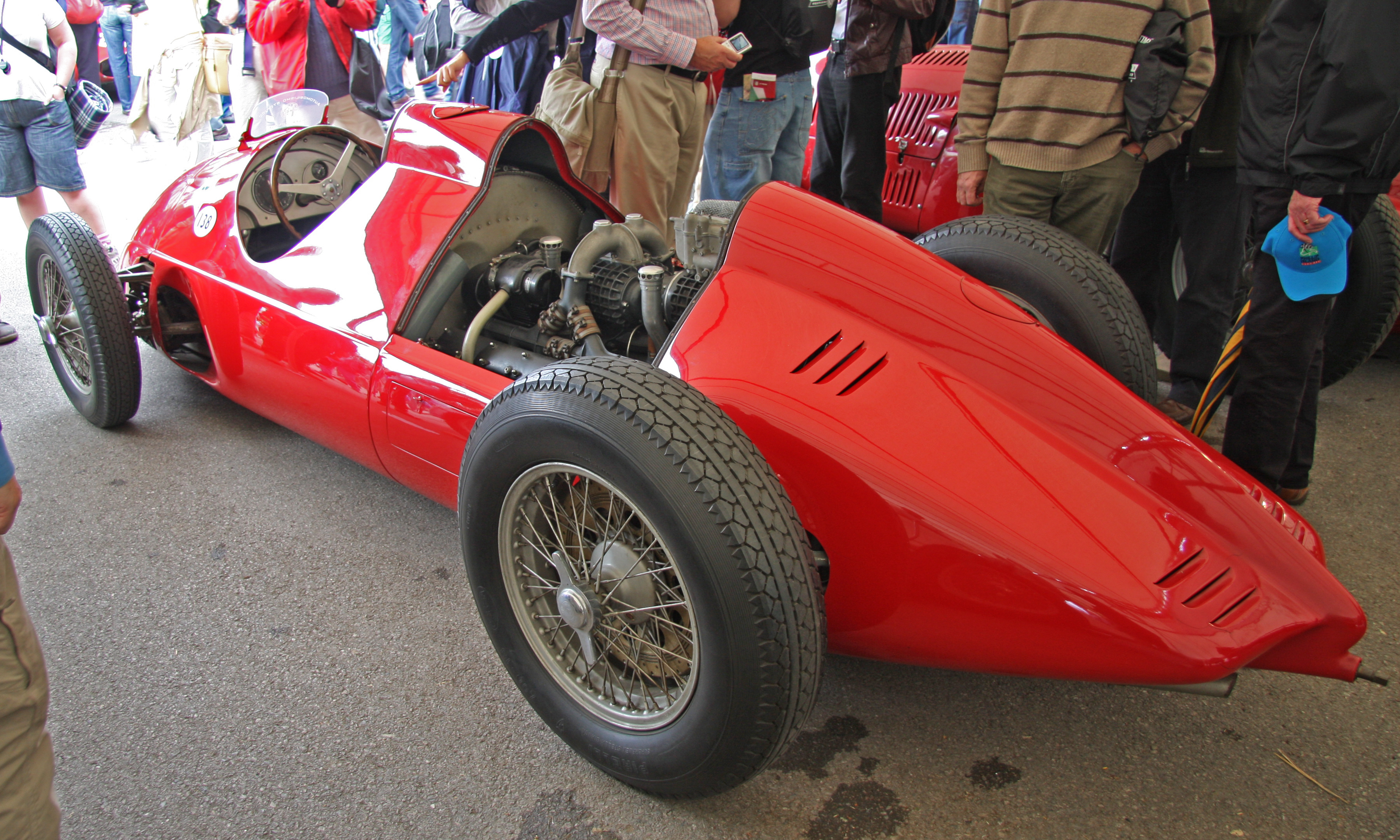 Alfa Romeo Tipo 512 Built 1940. 1.5 litre flat-12 335 bhp at 8,600 rpm